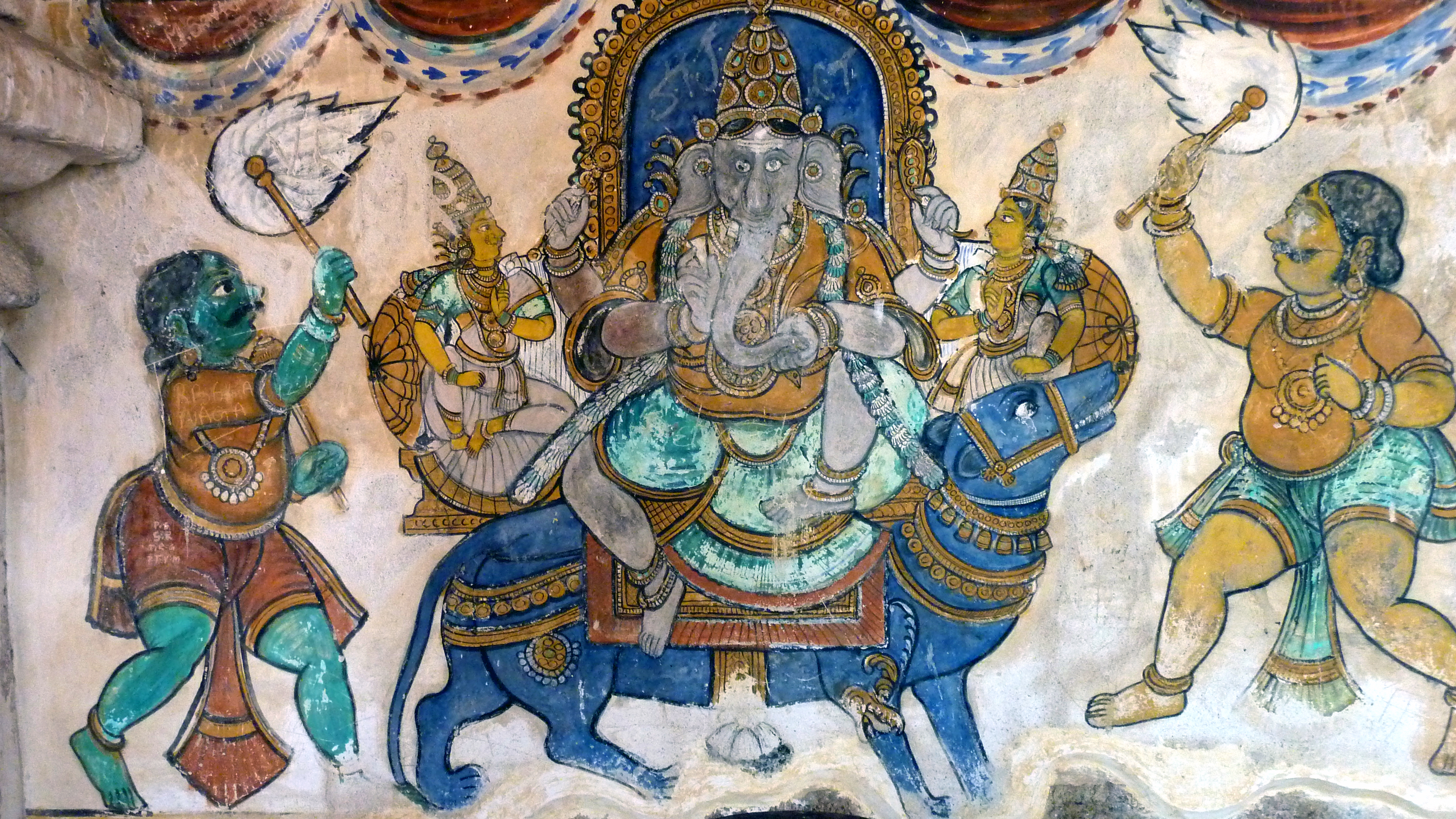 tanjore ganesh